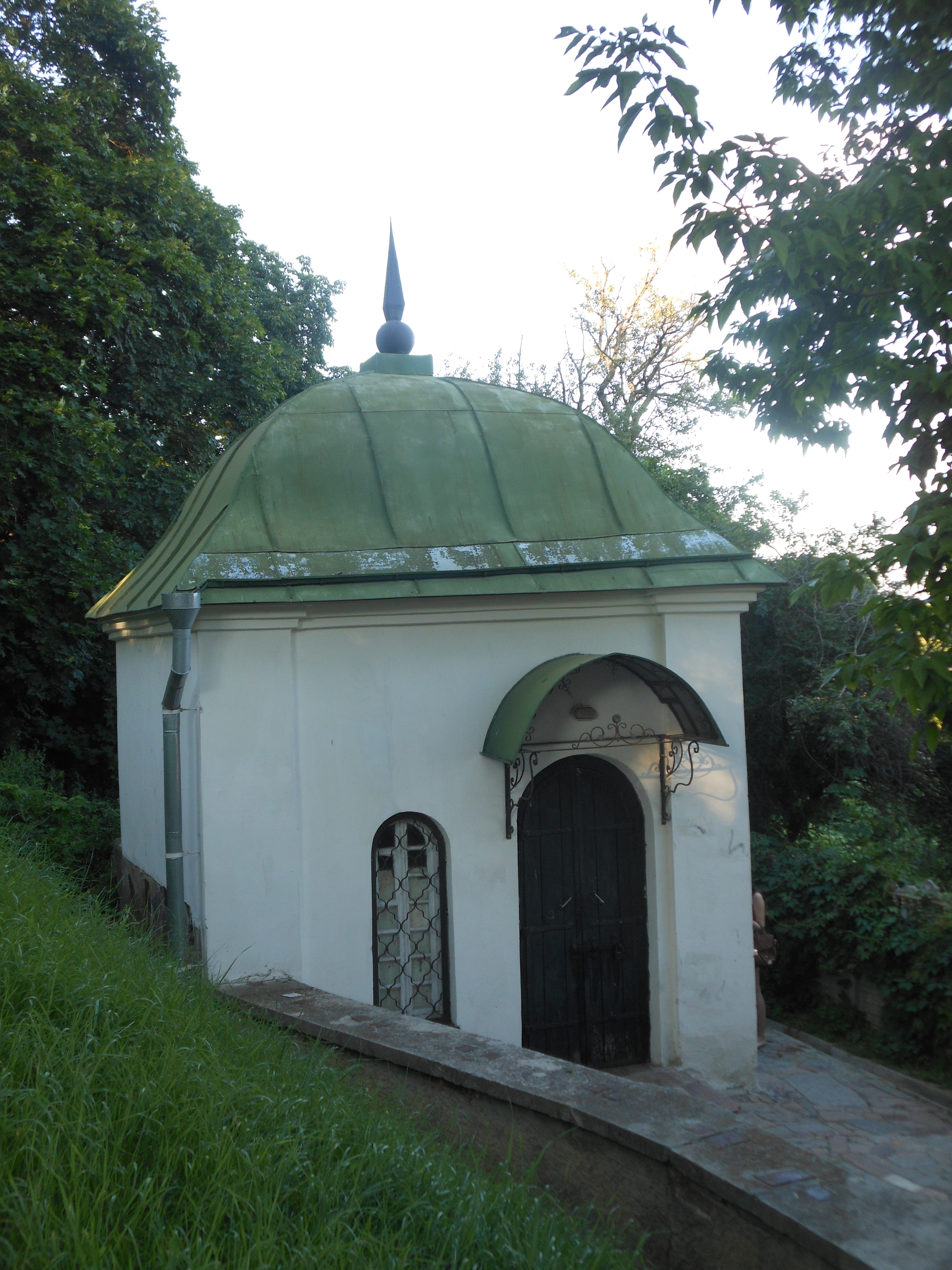 Комплекс споруд Іллінського монастиря (мур.), Чернігів, вул.Г.Успенського, 33